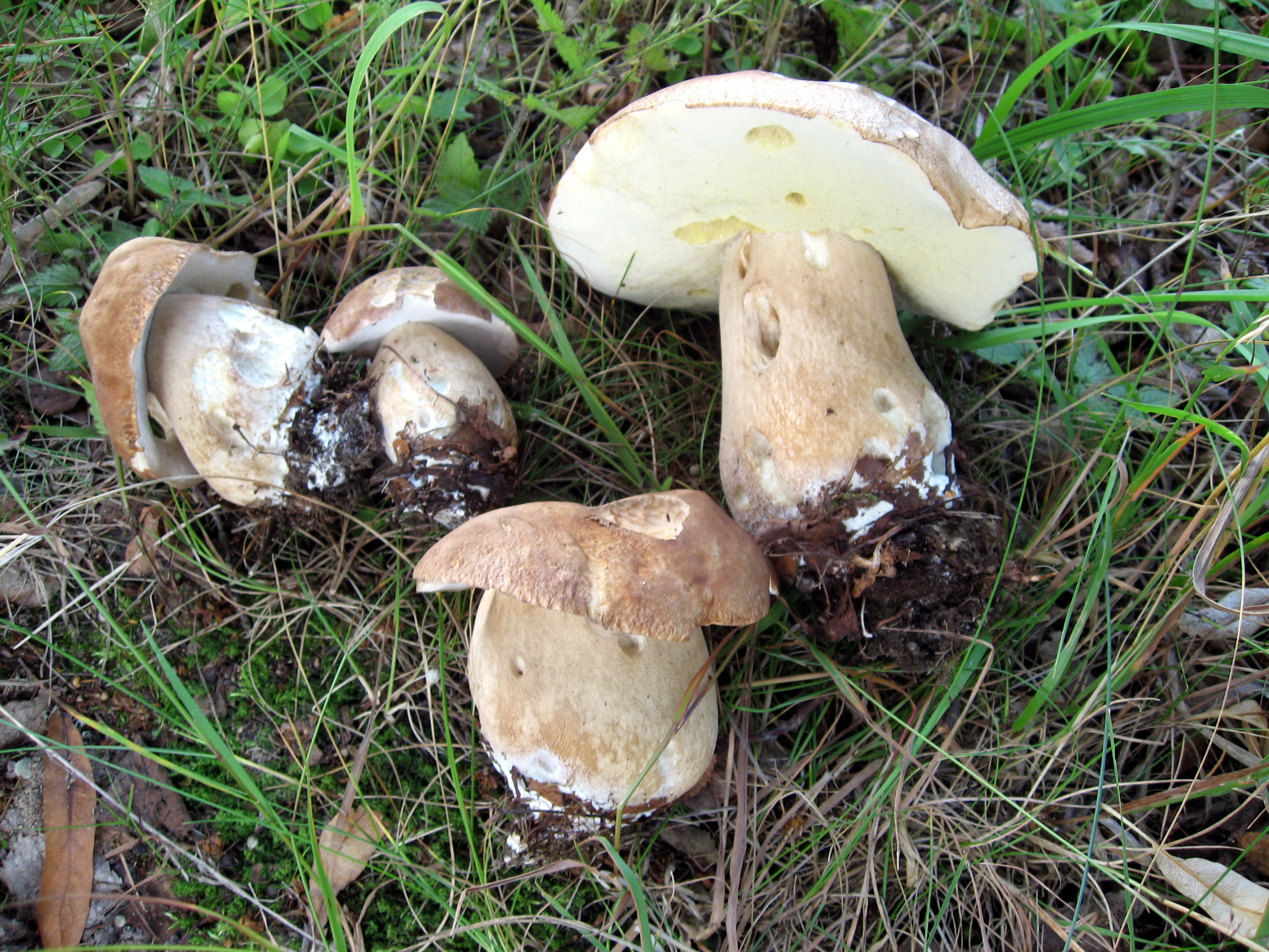 Hřib dubový